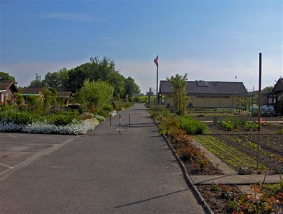 Chemin central du groupement.